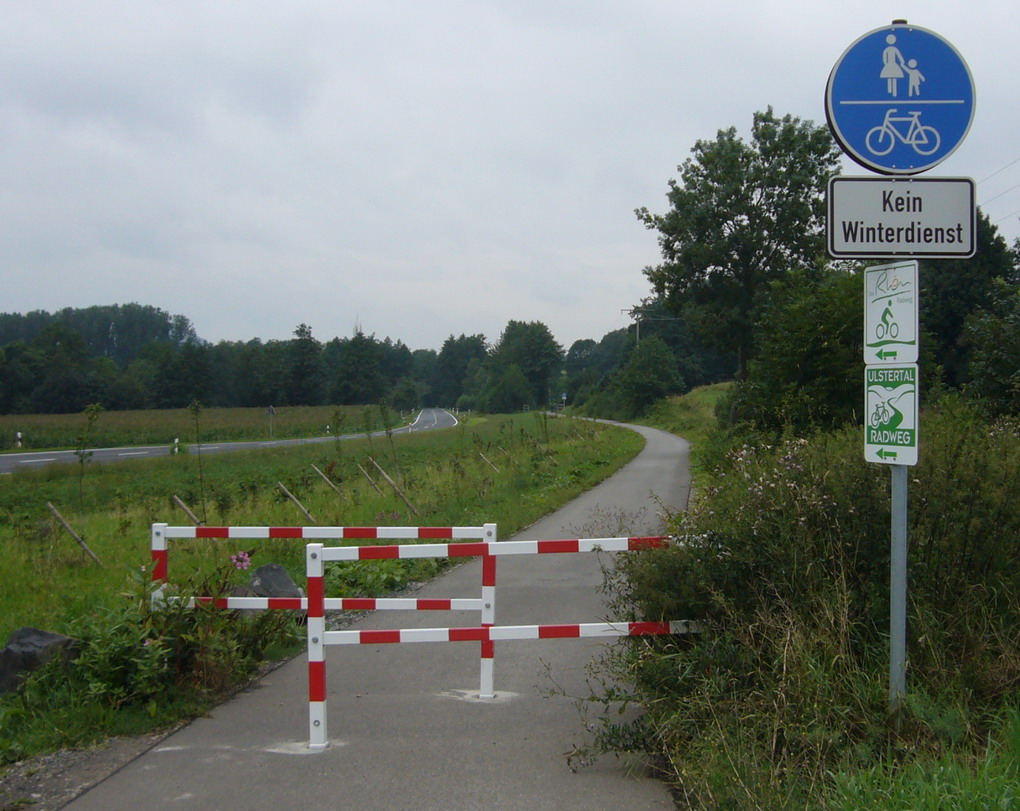 Ulstertal-Radweg bei Tann/Rhön (Hessen), neue Beschilderung im Verlauf des Rhönradwegs.